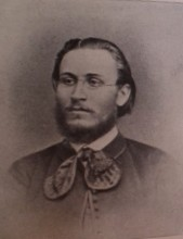 Spisovatel Ivan Klicpera